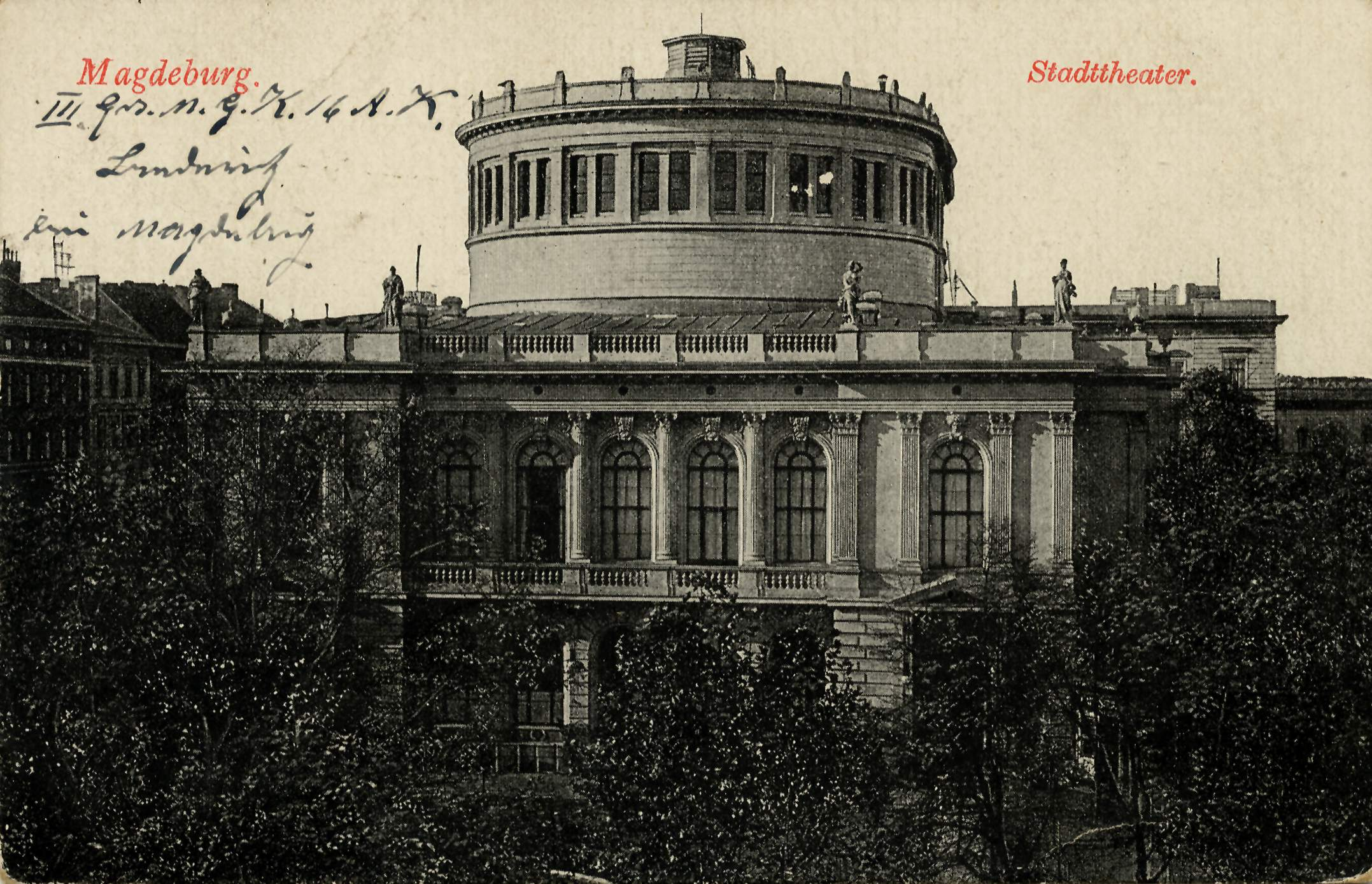 Stadttheater